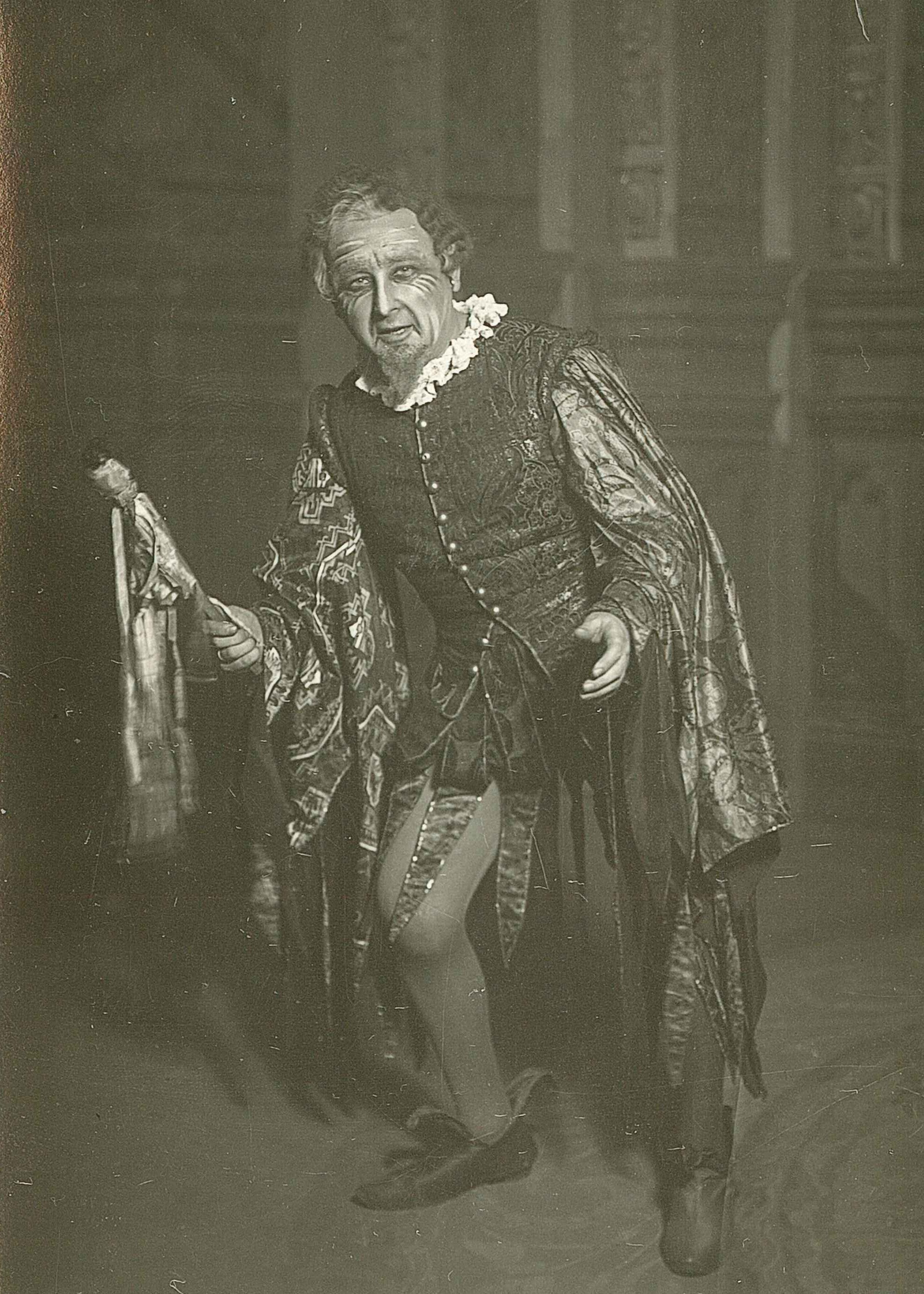 Carlo Tagliabue, Rigoletto (1928)